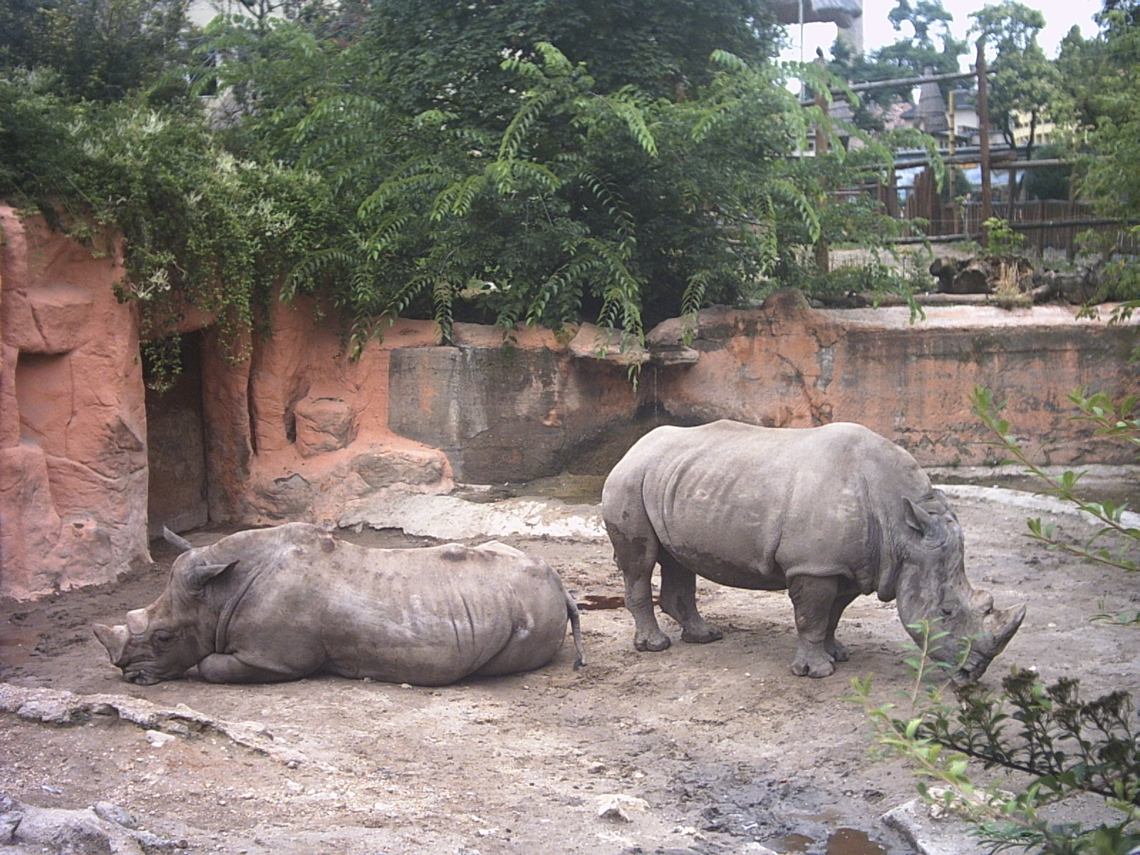 Two rhinos, Budapest zoo